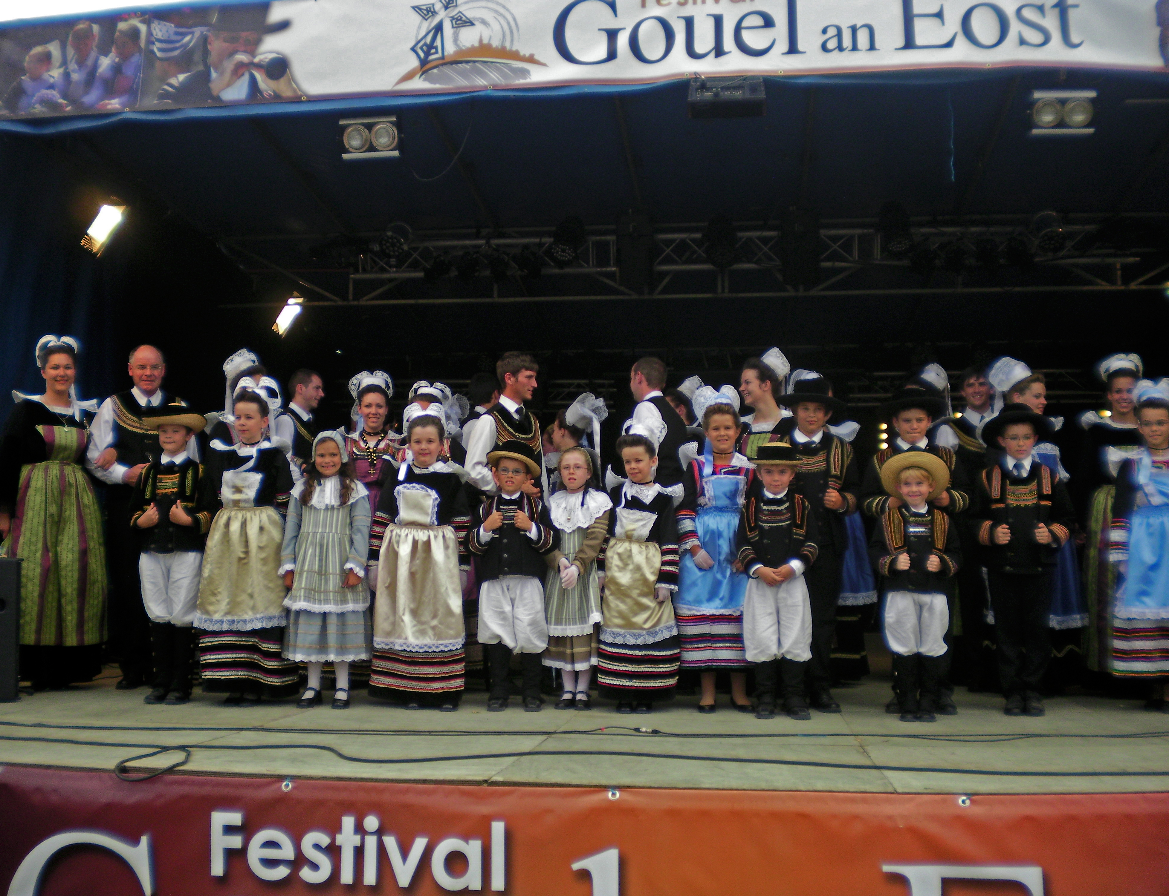 cercle Bleuniou Lann an Aven de Riec Sur Bélon au festival Gouel an Eost, 12 août 2012.